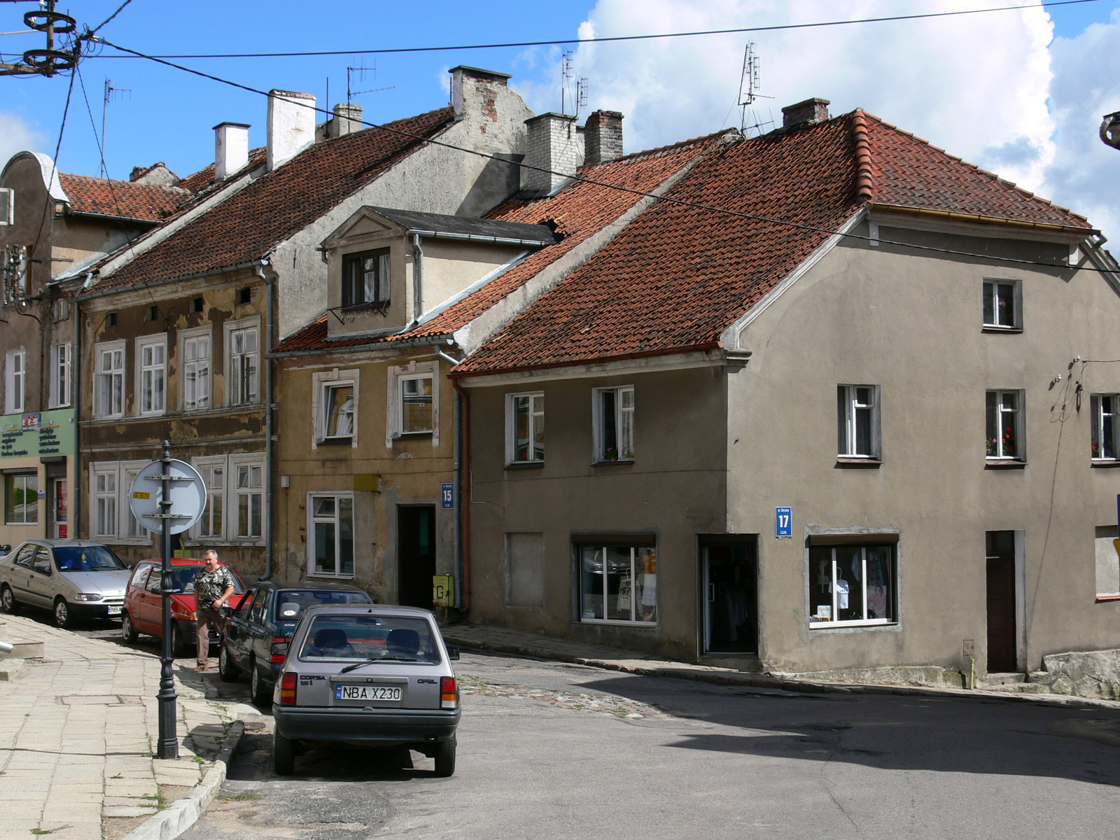 Górowo Iławeckie - fragment starówki